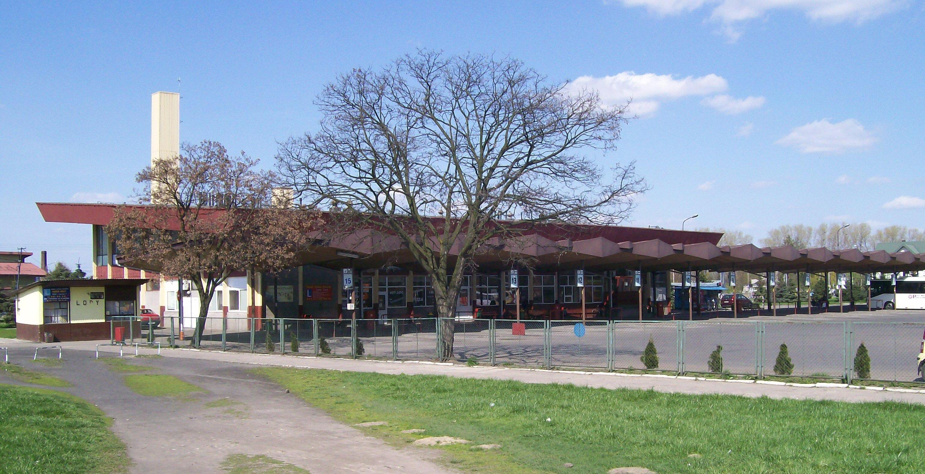 Dworzec PKS w Wieluniu - widok od ulicy Chopina.